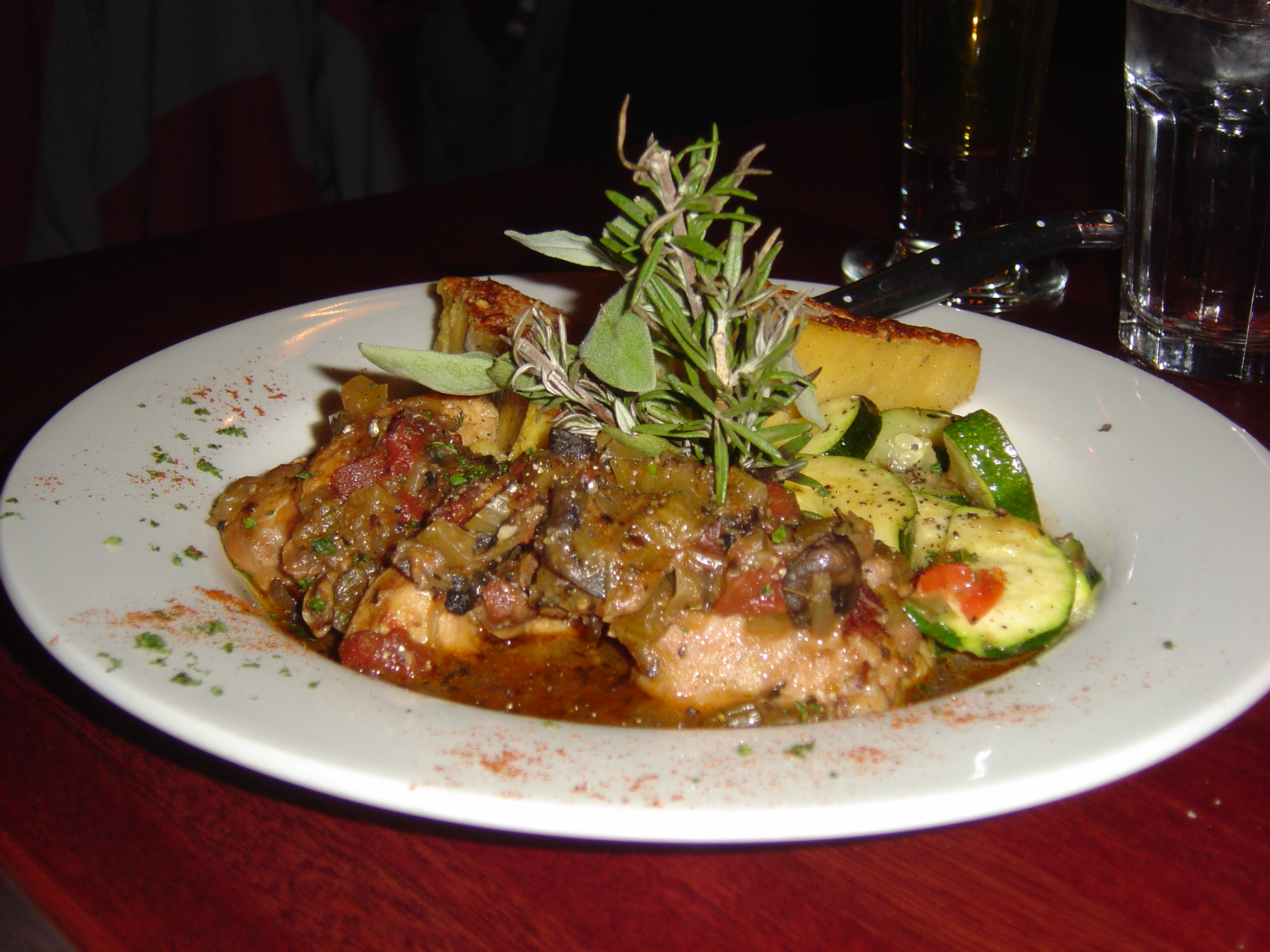 Braised Quebec rabbit cacciatore - Giorgio's Trattoria